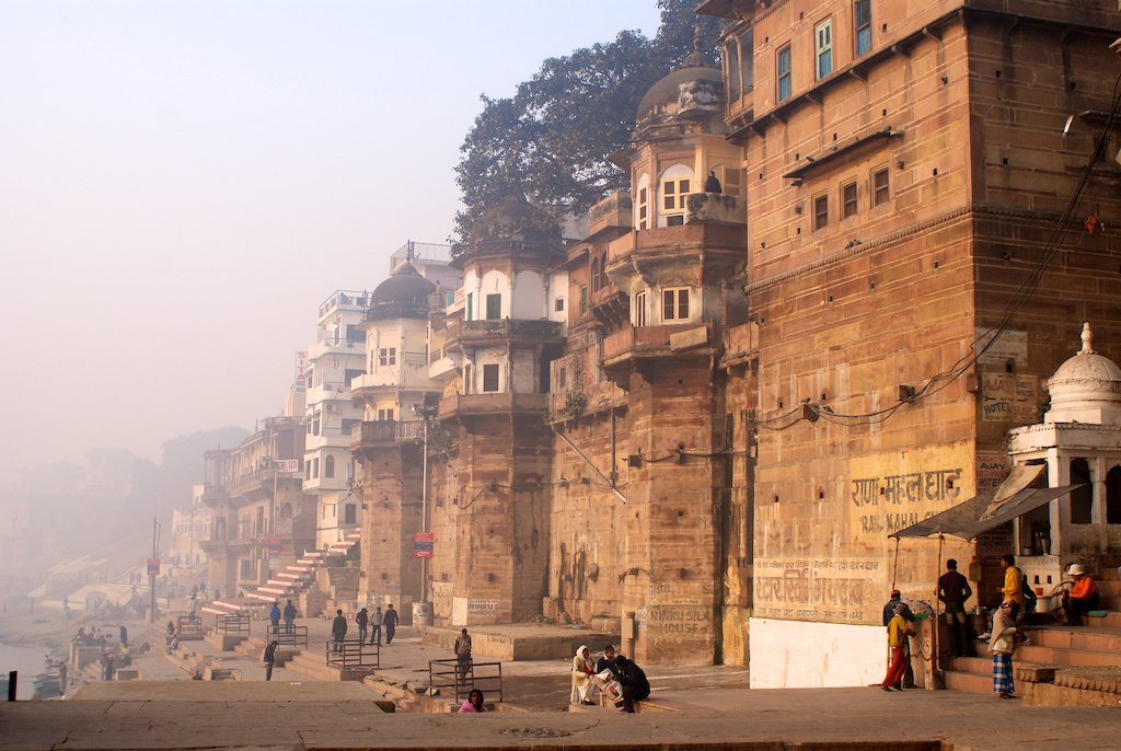 Rana Mahal ghat in Varanasi